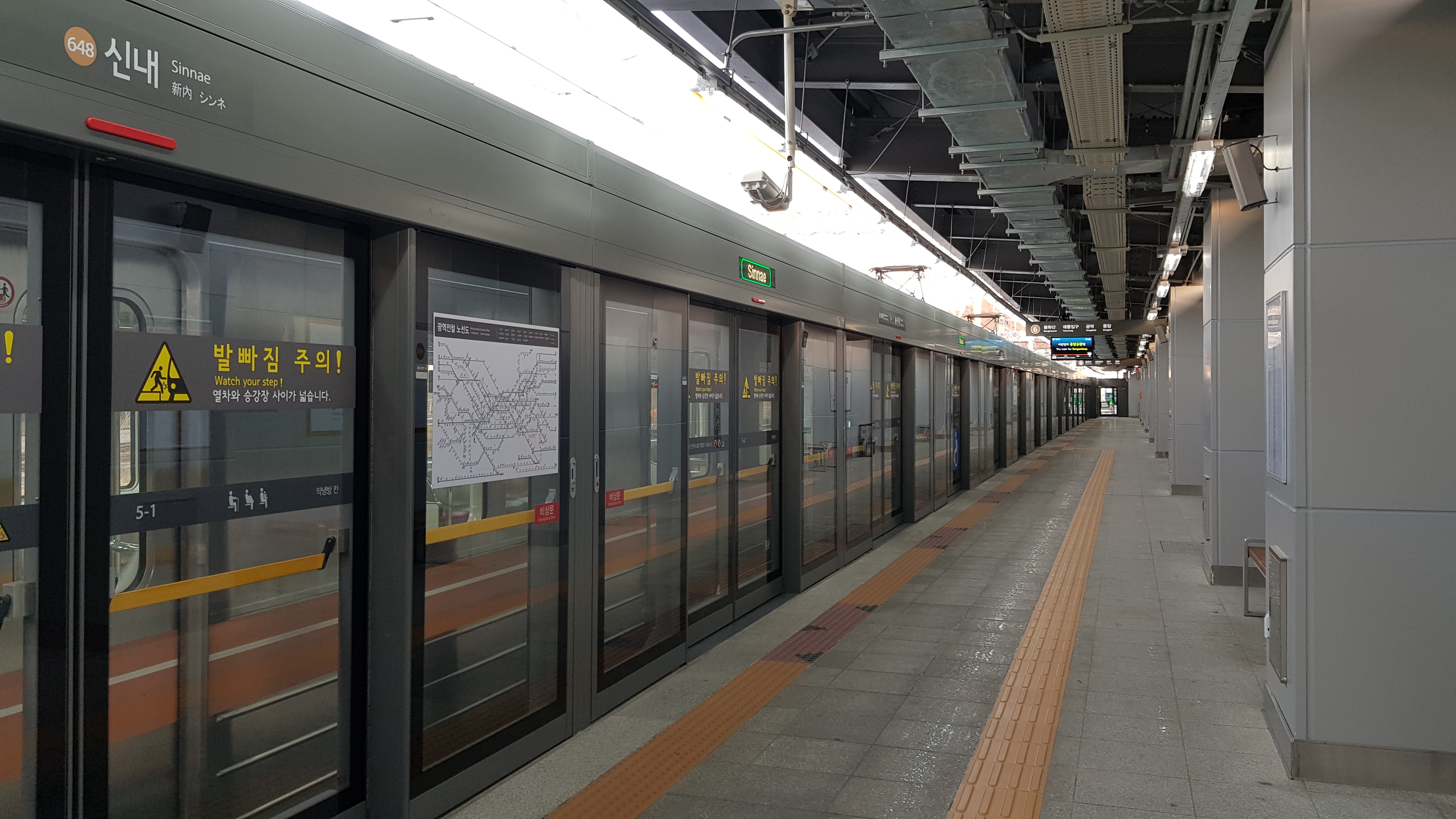 6호선 신내역 승강장